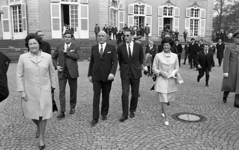 Staatsbesuch des belgischen Königspaares. Empfang im Schloß Benrath